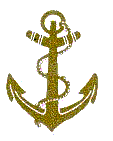 insigne des troupes de marine